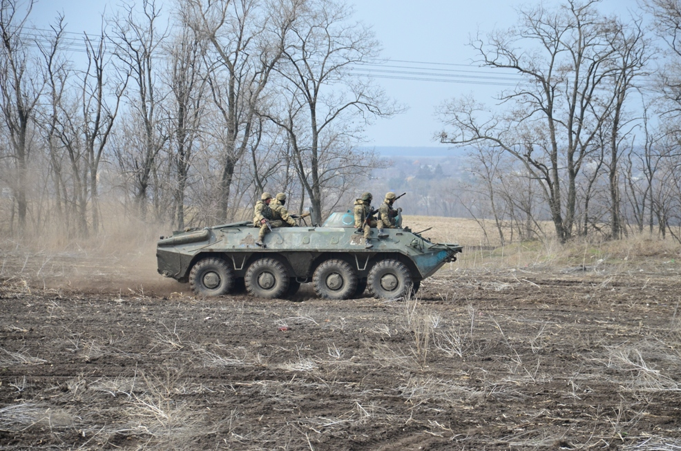 Механізовані підрозділи 92-ї окремої механізованої бригади відбили напад умовного противника Близько 60 одиниць різної гусеничної та колісної броньованої техніки задіяли на навчаннях, які пройшли в 92-й окремій механізованій бригаді. До умовного бою залучили по два механізованих і танкових підрозділи. Також на навчальне поле вийшла батарея протитанкових керованих ракет та мінометні розрахунки. Окрім них попрактикувалися у своїй роботі й артилеристи з протитанкової батареї МТ-12 «Рапіра».